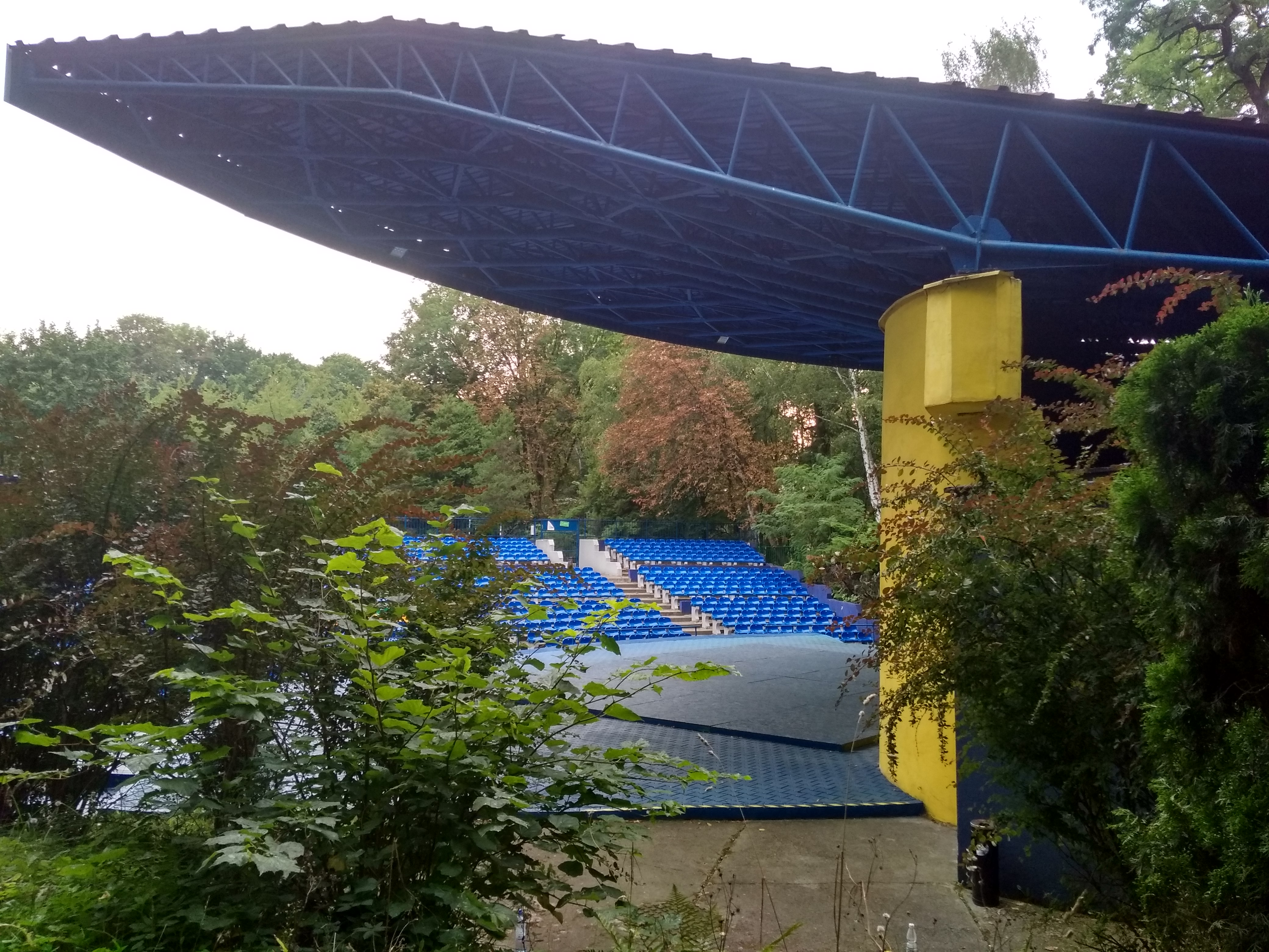 Amfiteatr w Siemianowicach Śląskich